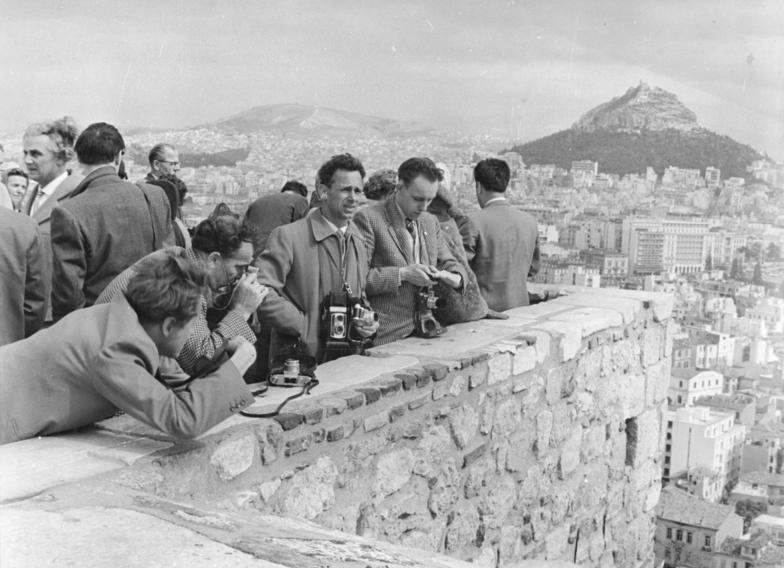 Zentralbild Schaar-9.3.1960 FDGB-Urlauberschiff "Völkerfreundschaft" in Constanta. Nach dreizehntägiger Fahrt ist das erste FDGB-Urlauberschiff der DDR, die "Völkerfreundschaft", am Vormittag des 7. März 1960 in dem rumänischen Schwarzmeerhafen Constanta vor Anker gegangen. Damit hat der moderne Hochsee-Passagierdampfer, der aus Mitteln der Steckenpferdbewegung aus Schweden angekauft worden war, seine erste Reise erfolgreich beendet. UBz: Blick von der Akropolis auf Athen.